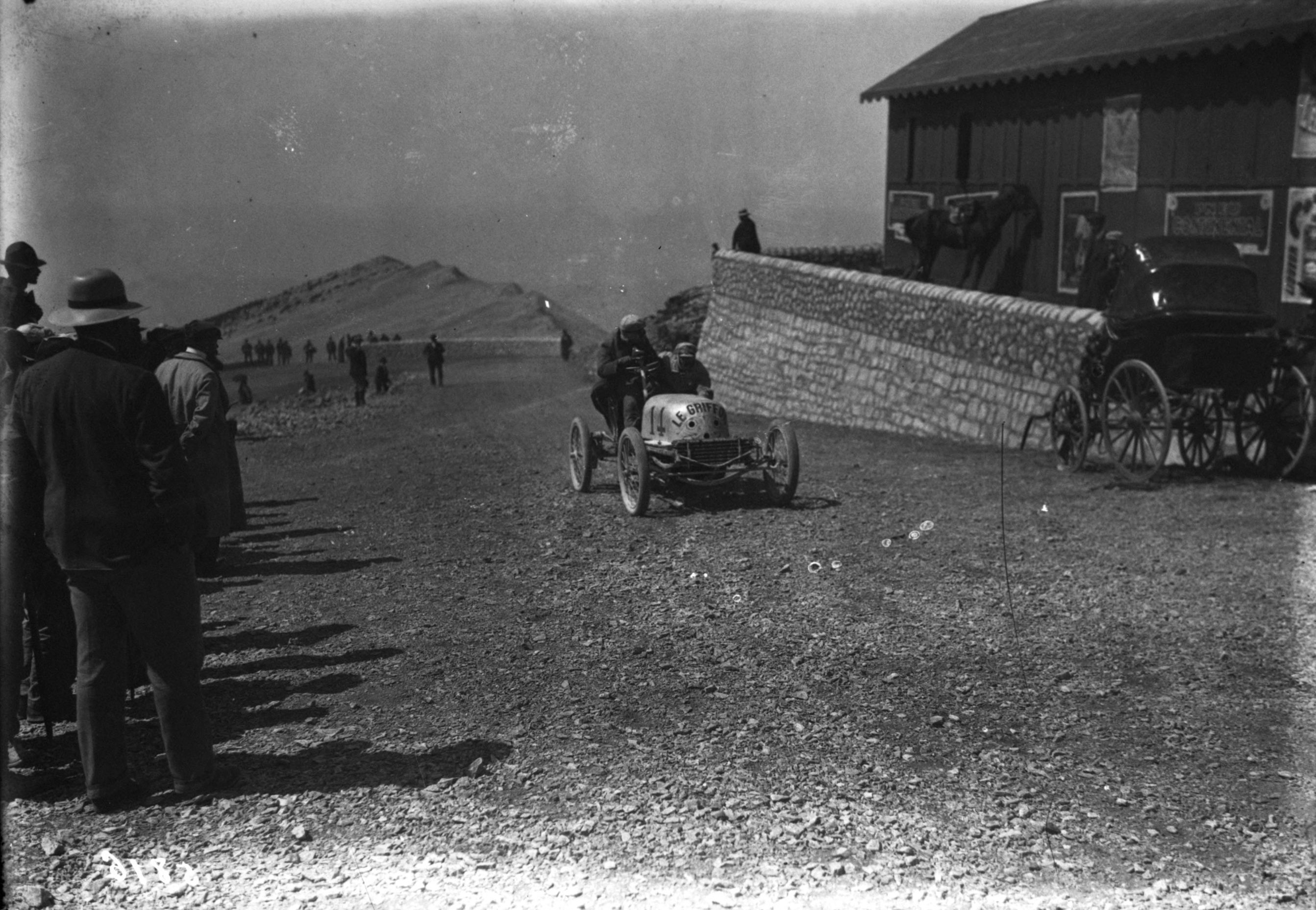 Arrivée au sommet du Mont Ventoux d'une voiture Richard-Barsier, lors d'une course en 1906